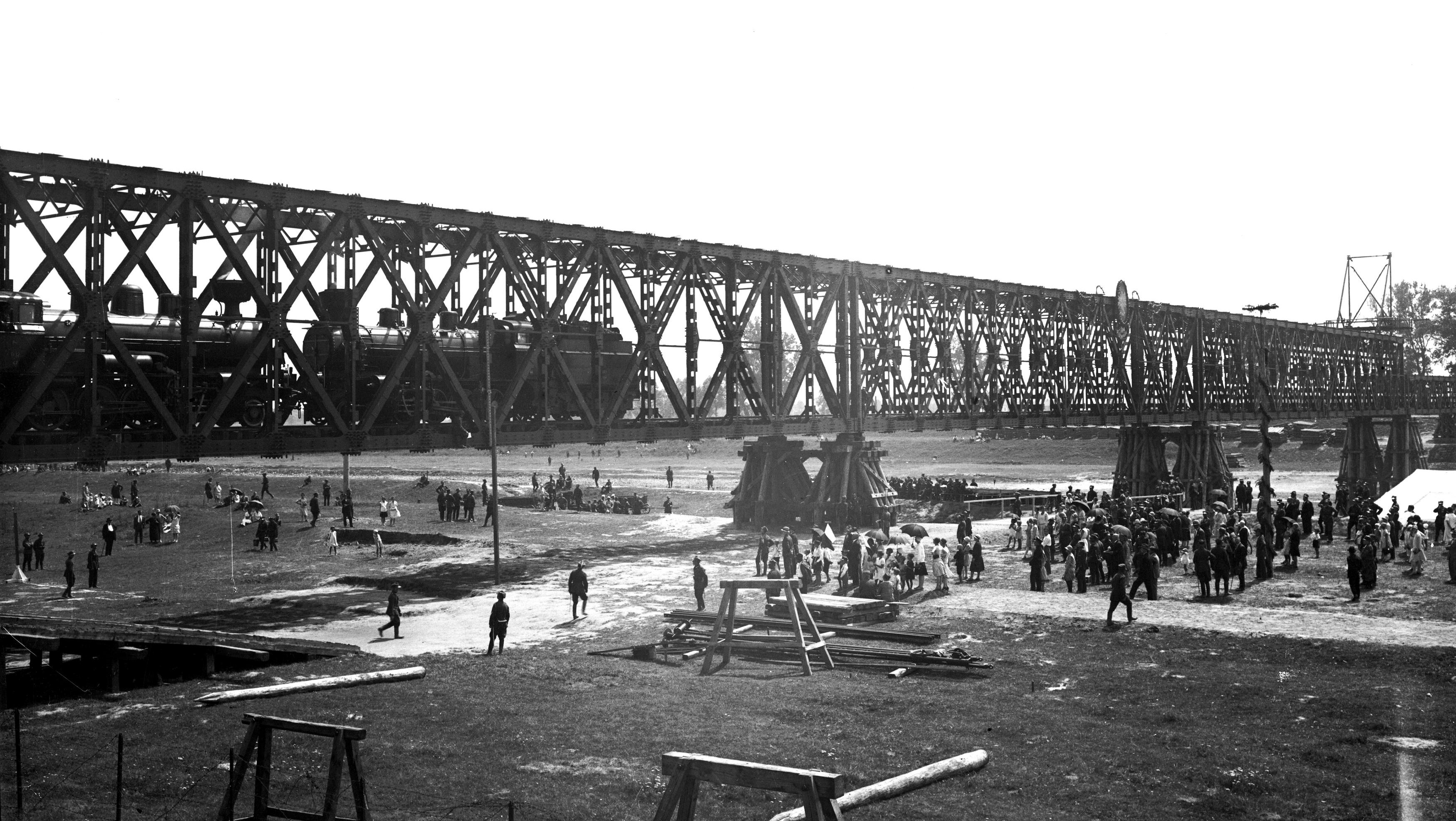 Most kolejowy na Narwi budowany przez 1 i 2 Pułk Saperów Kolejowych; lipiec 1929 r. Na moście widoczne parowozy Tr 12 podczas próby obciążenia mostu. Koncern Ilustrowany Kurier Codzienny - Archiwum Ilustracji. Sygnatura: 1-G-3448-6